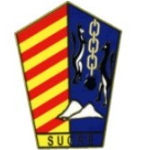 Escudo antiguo perteneciente al colegio del Sagrado Corazón, de la ciudad de Sucre, Bolivia.